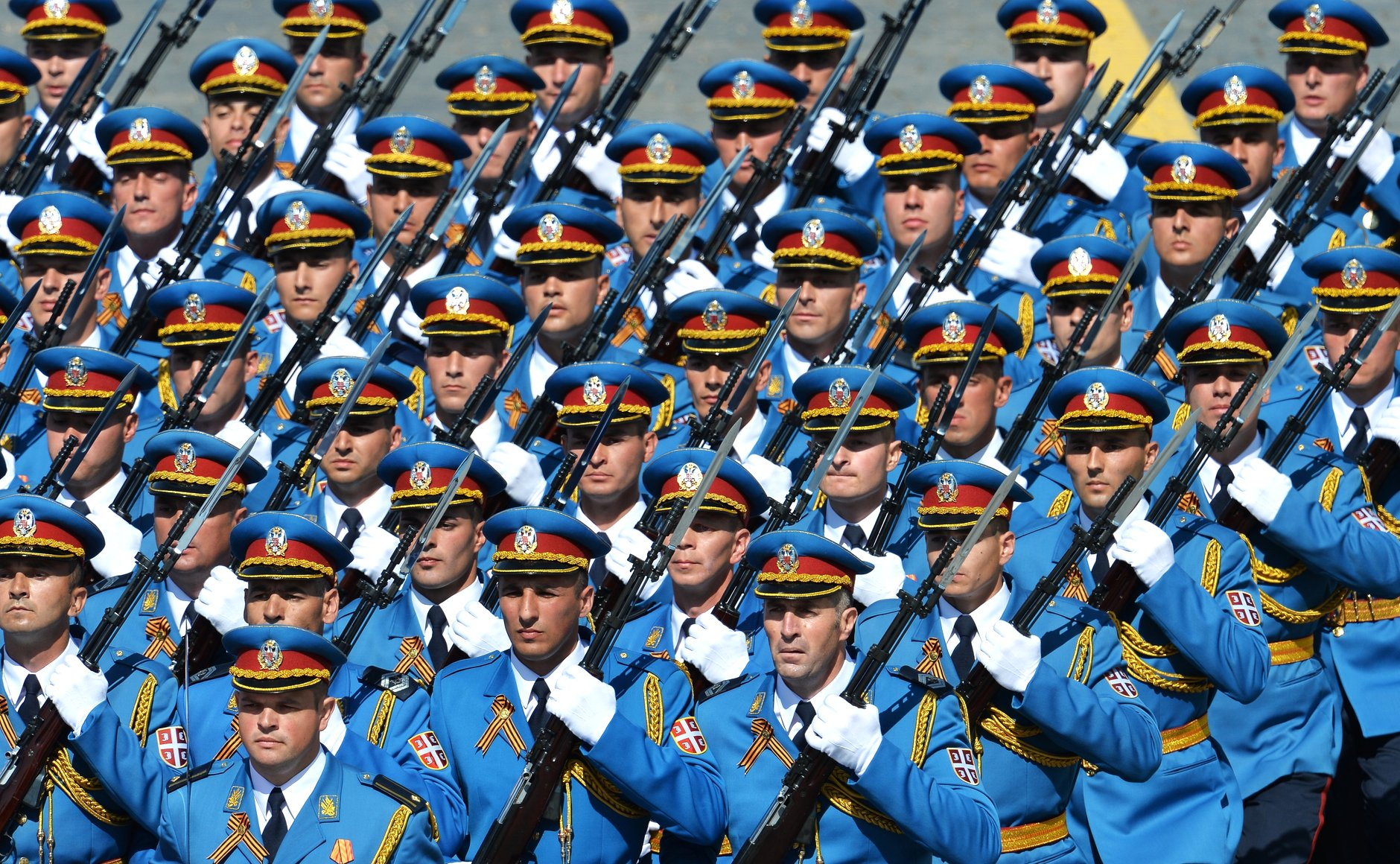 Военный парад в ознаменование 70-й годовщины Победы в Великой Отечественной войне 1941–1945 годов. Военнослужащие Вооружённых сил Сербии.